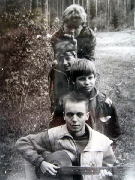 Беларуская (тарашкевіца): Выхаванцы А. Грушэцкага са зьвязу «Рыцары»